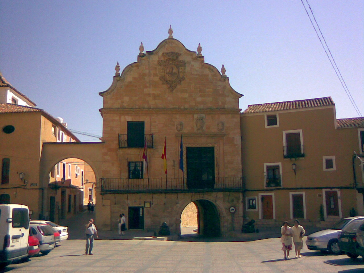 Plaza de La Mancha en Chinchilla de Monte-Aragón (Albacete, España)